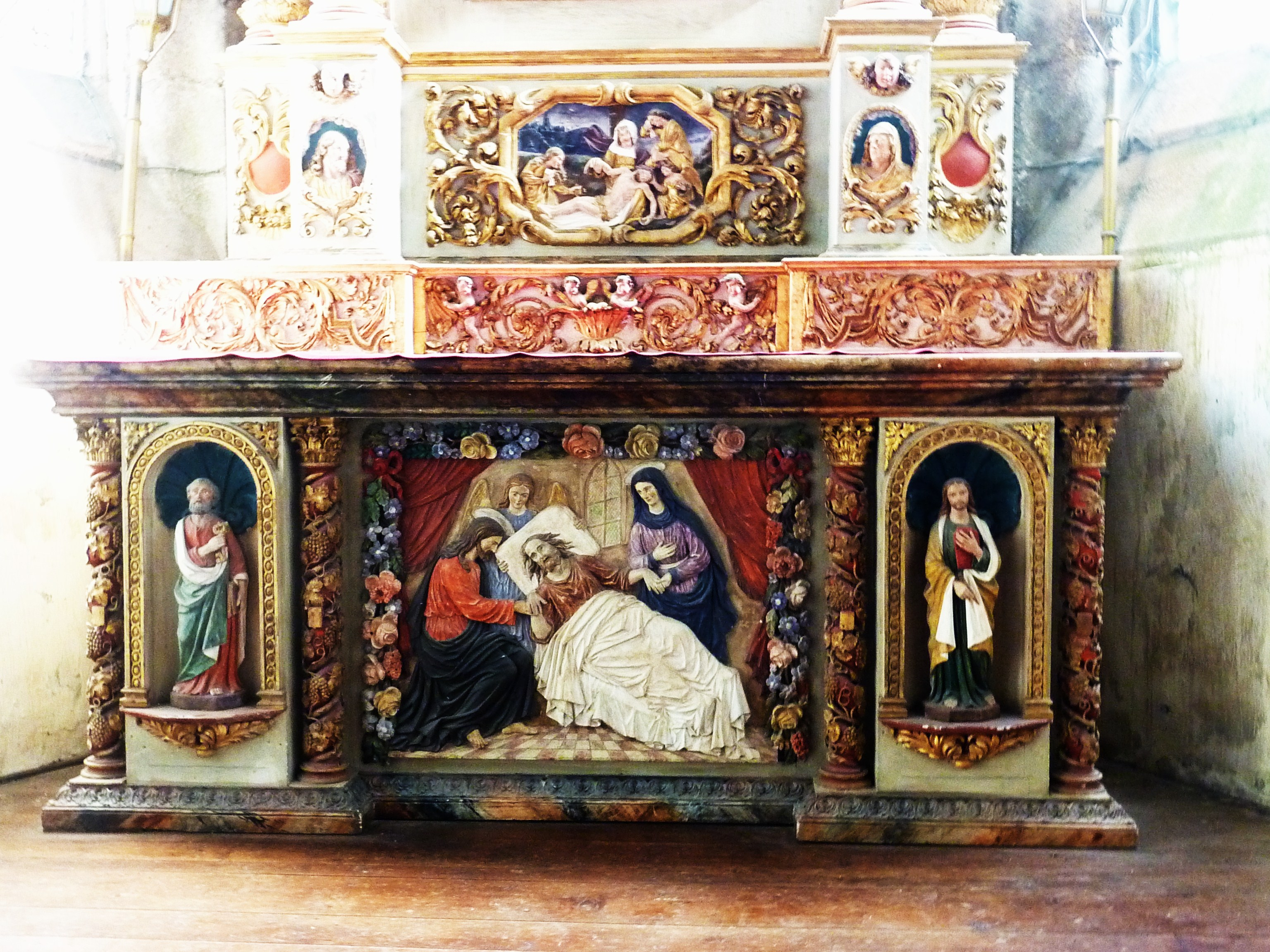 Saint-Thégonnec, ossuaire, autel, la mort de saint Joseph